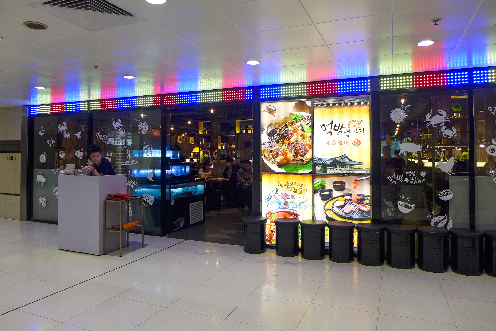 MeokBang Korean BBQ